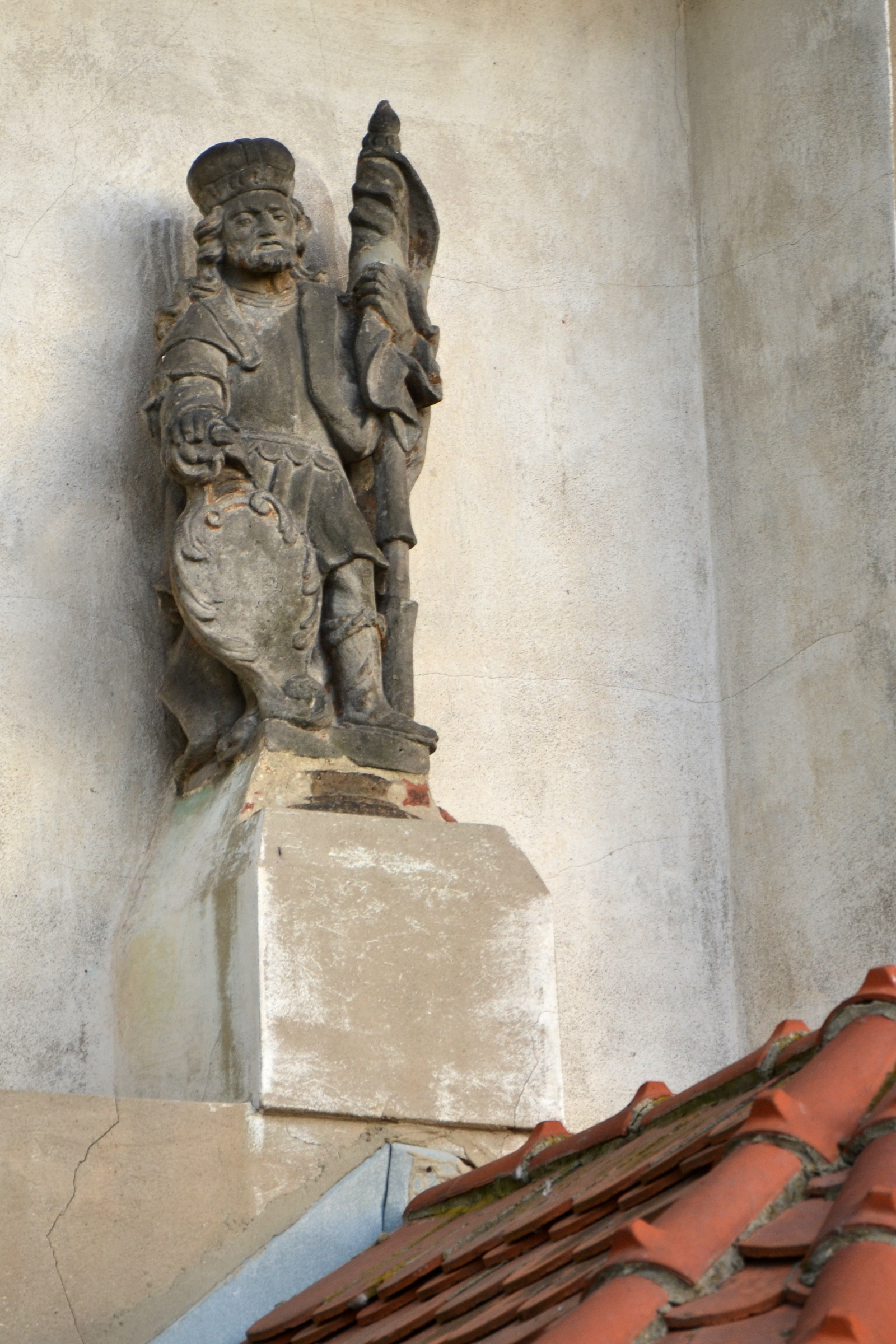 Socha sv. Václava (Strupčice), Strupčice